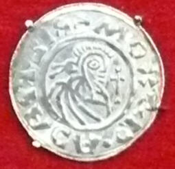 Denár Boleslava II.